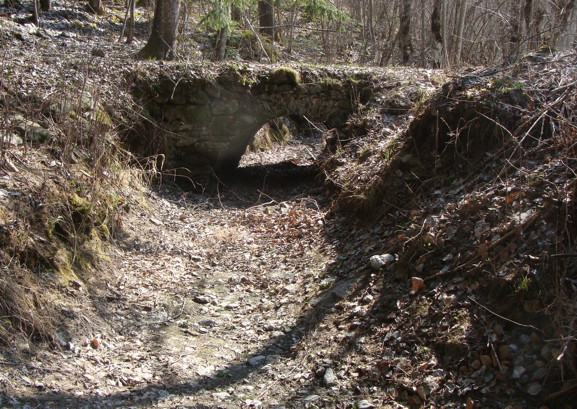 Pont (en pierre) sur le canal des Herbeys, près de la Chaup, commune de Saint-Jacques-en-Valgodemard.